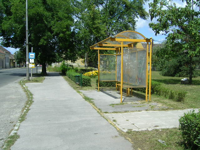 Rákóczi téri autóbusz-megálló, Vác